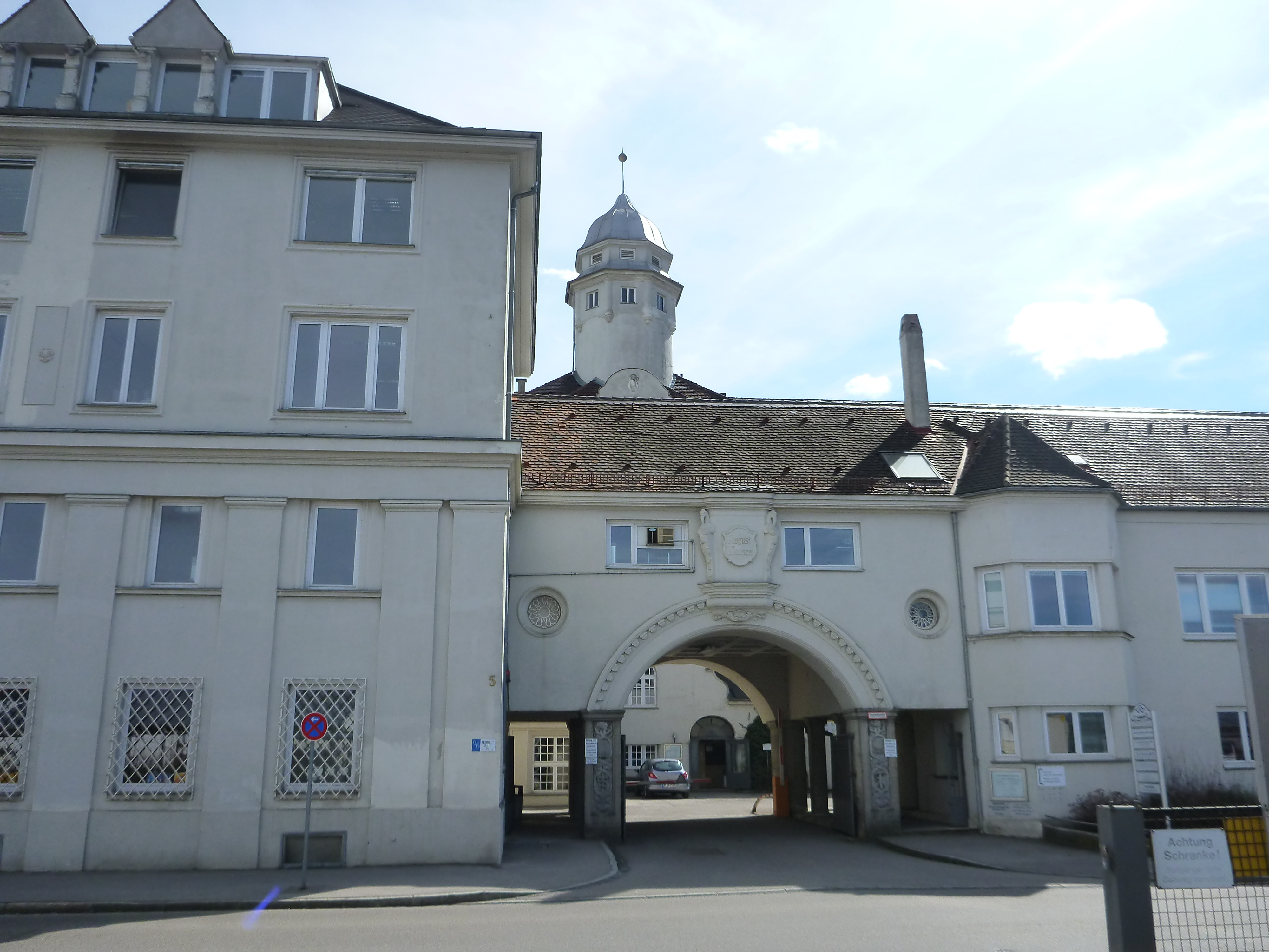 Nordtor der Fabrik, Baudenkmal